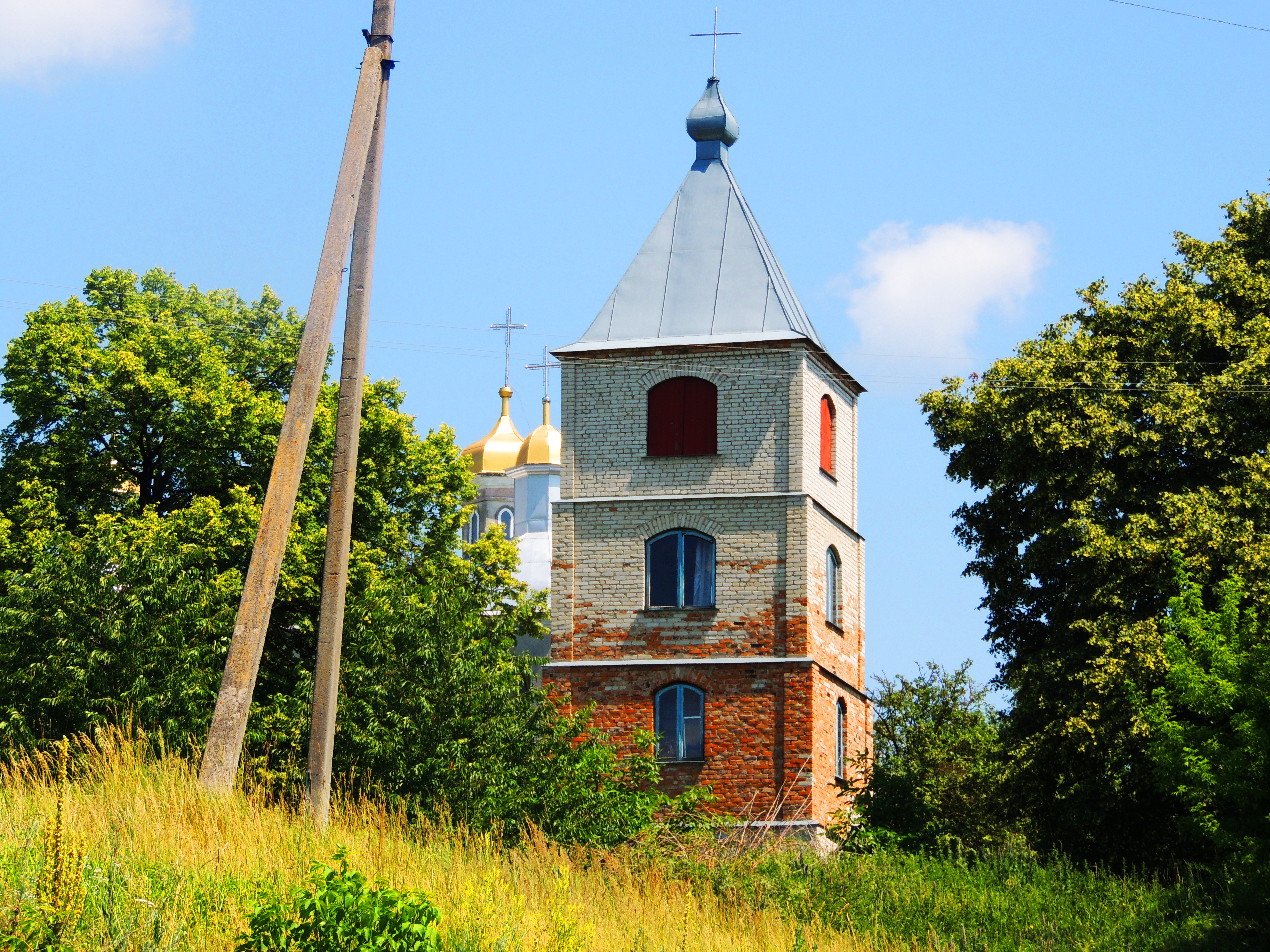 Дзвіниця Михайлівської церкви